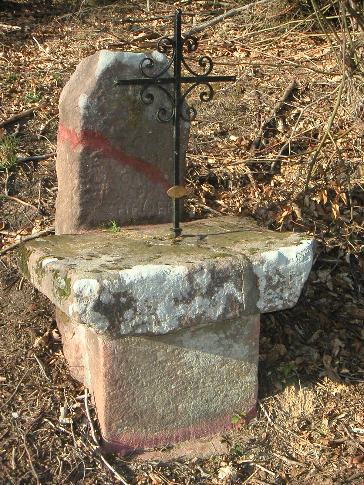 croix rurale en grès rose (réparée) route du lieu-dit la Criquette - Raon-l'Étape 88372